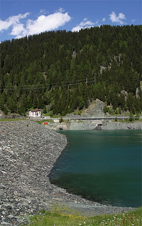 Erdschüttdamm Marmorera (Castiletto)